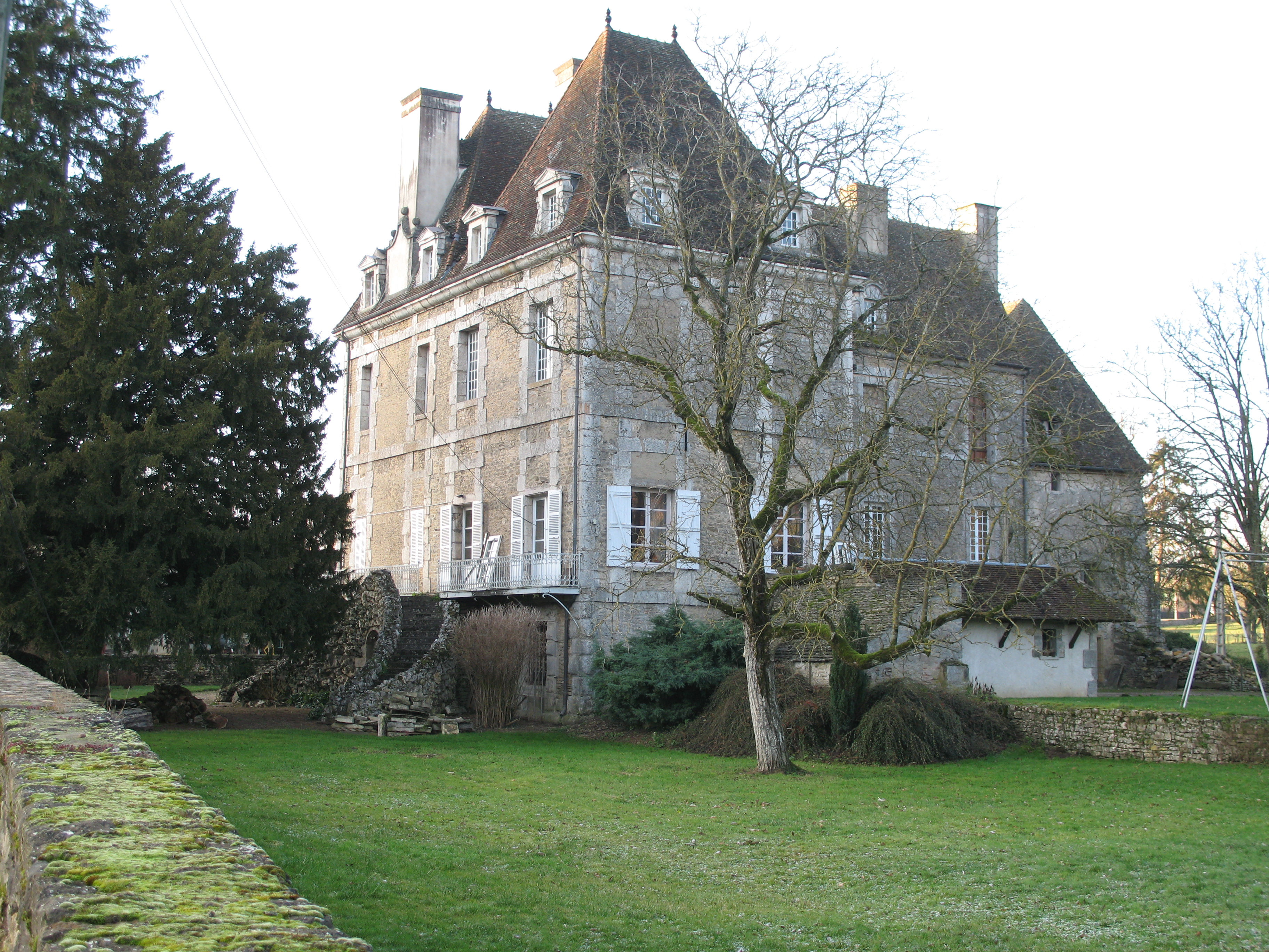 château de Chamilly (Saône-et-Loire)